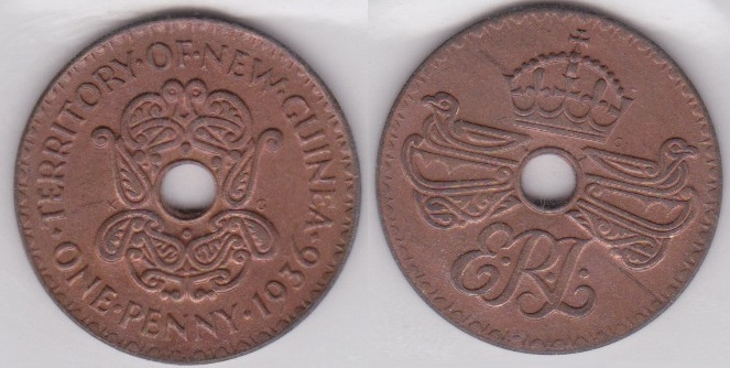 Moneda de 1 penique del Territorio de Nueva Guinea